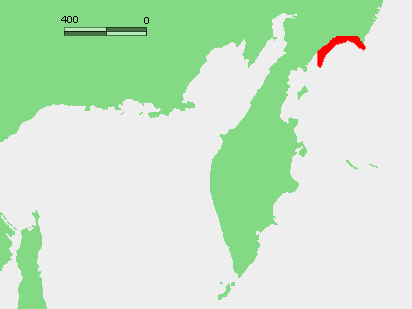 Олюторский залив